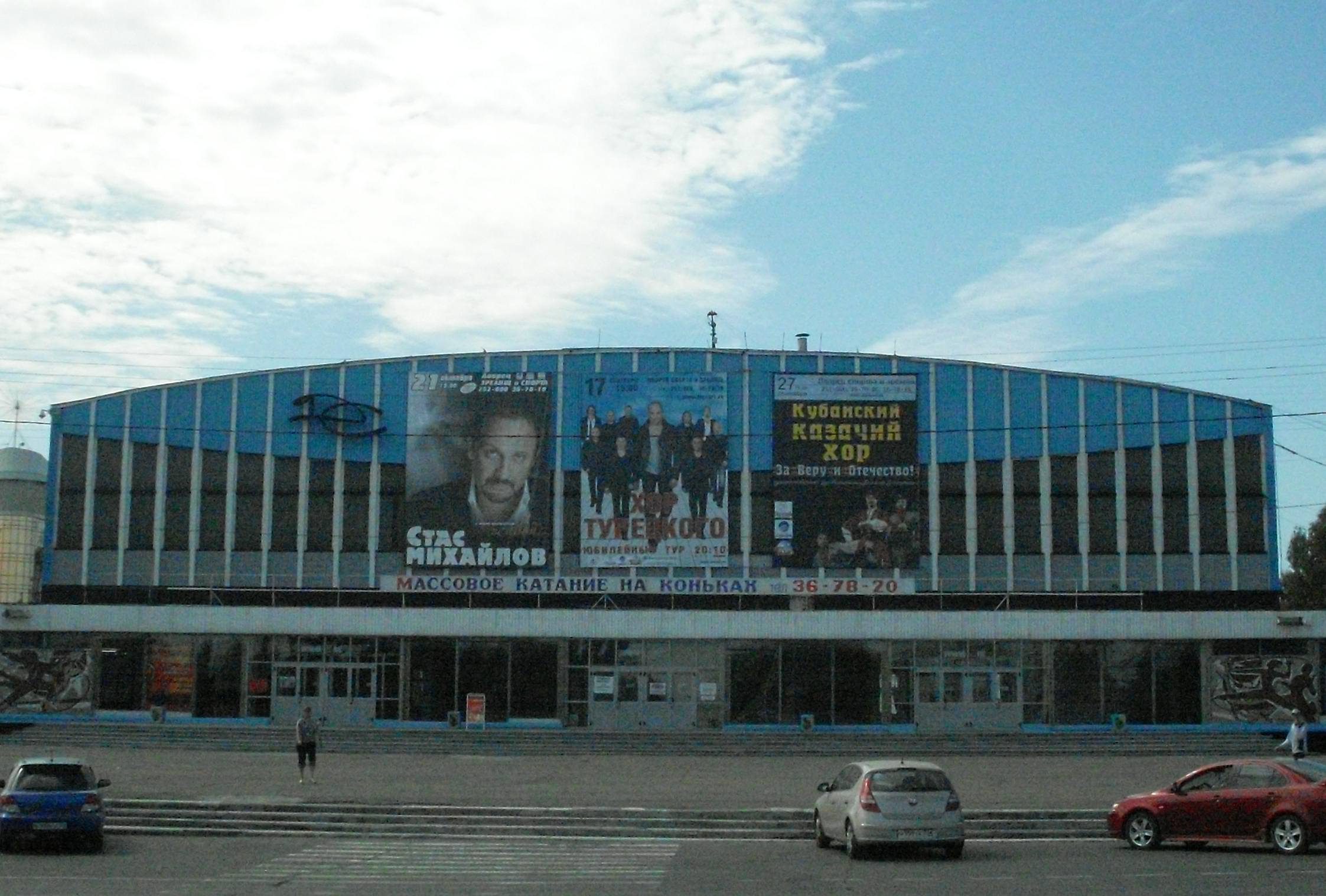 Дворец Спорта, Барнаул, Россия